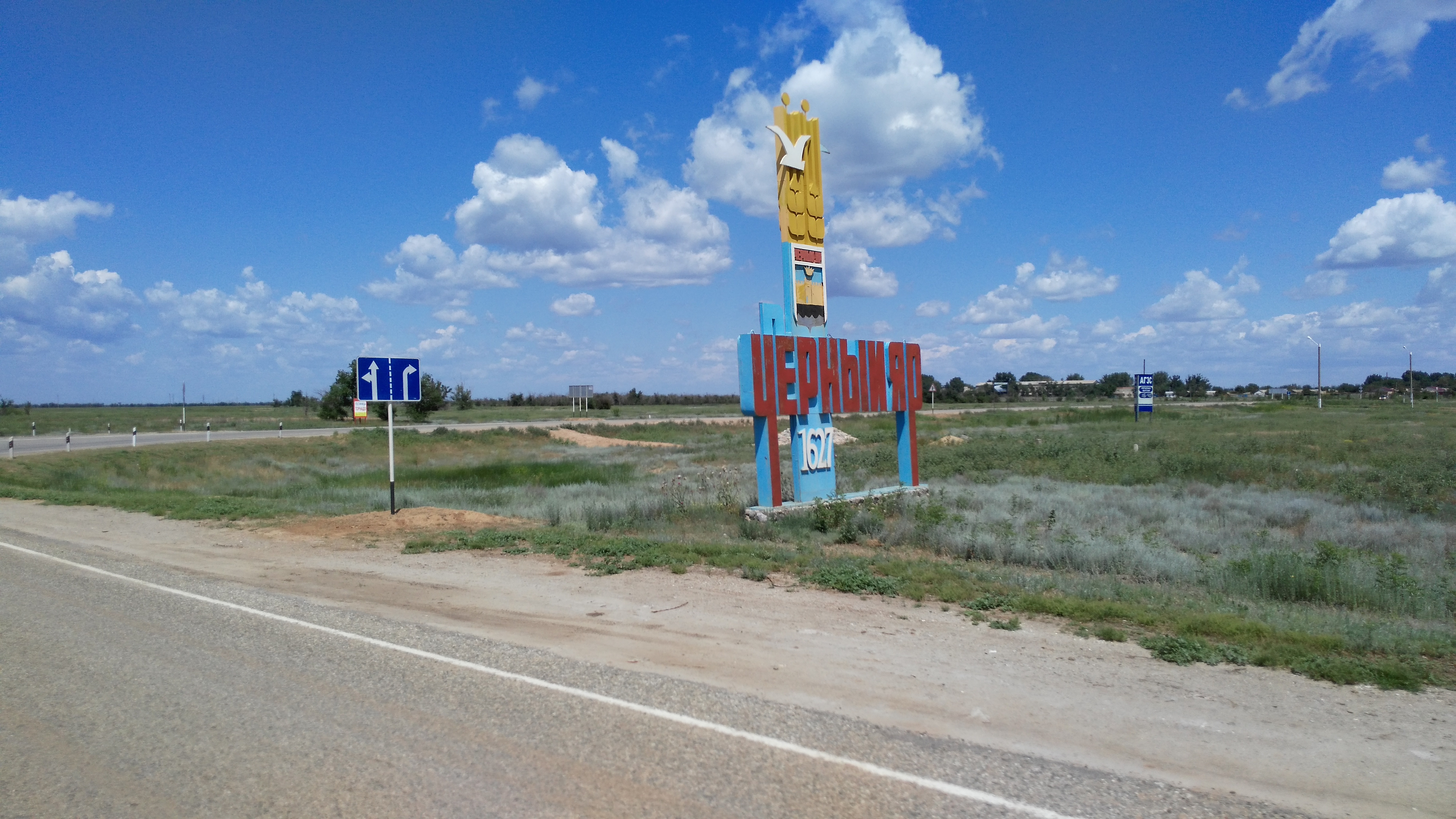 Село Чёрный ЯР Астраханской области. Трасса М-6. 2016 год.